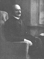 JUDr. Otto Mettal